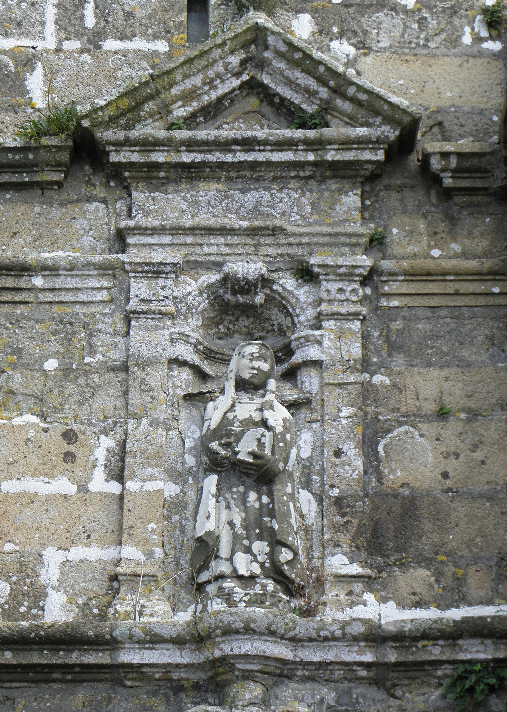 Statue de Sainte-Nonne de la niche de la façade occidentale de l'église Sainte-Nonne de Dirinon (29).